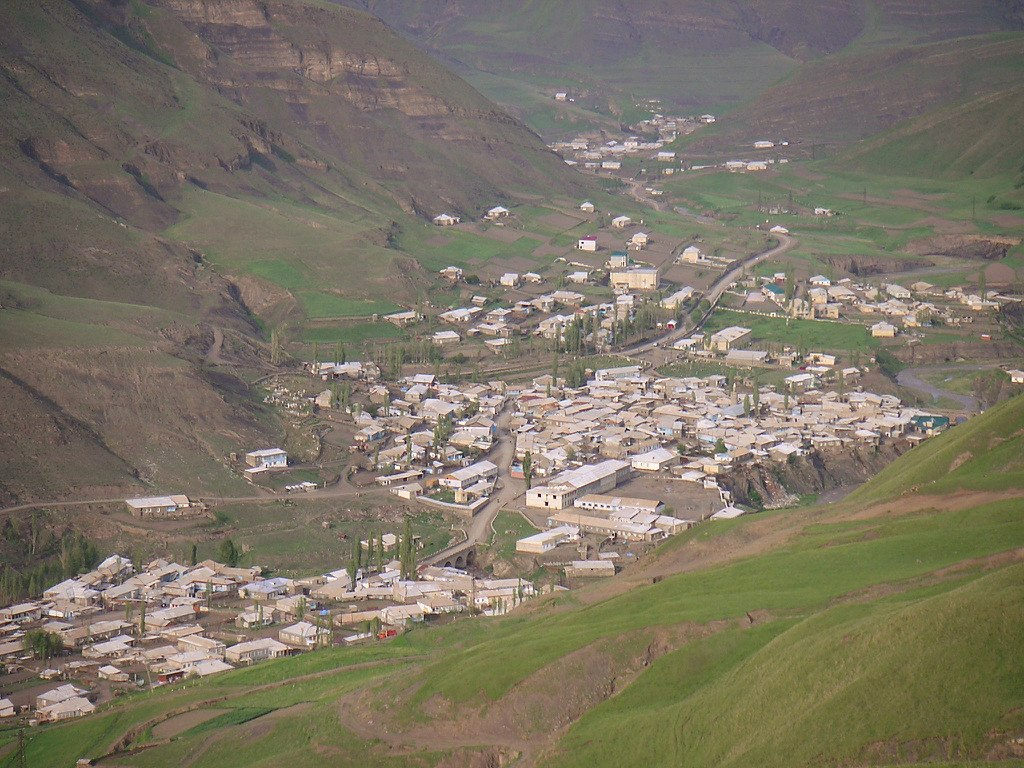 село Тпиг, Агульский район